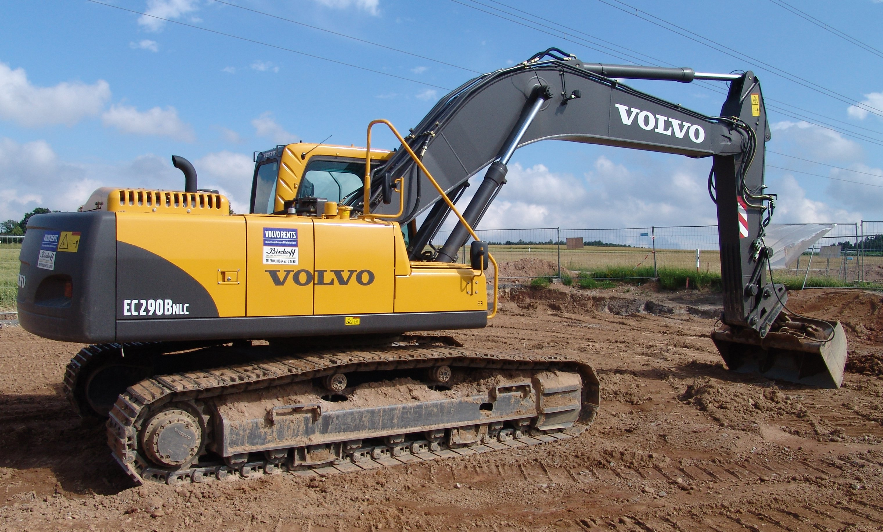 Volvo Kettenbagger EC290B